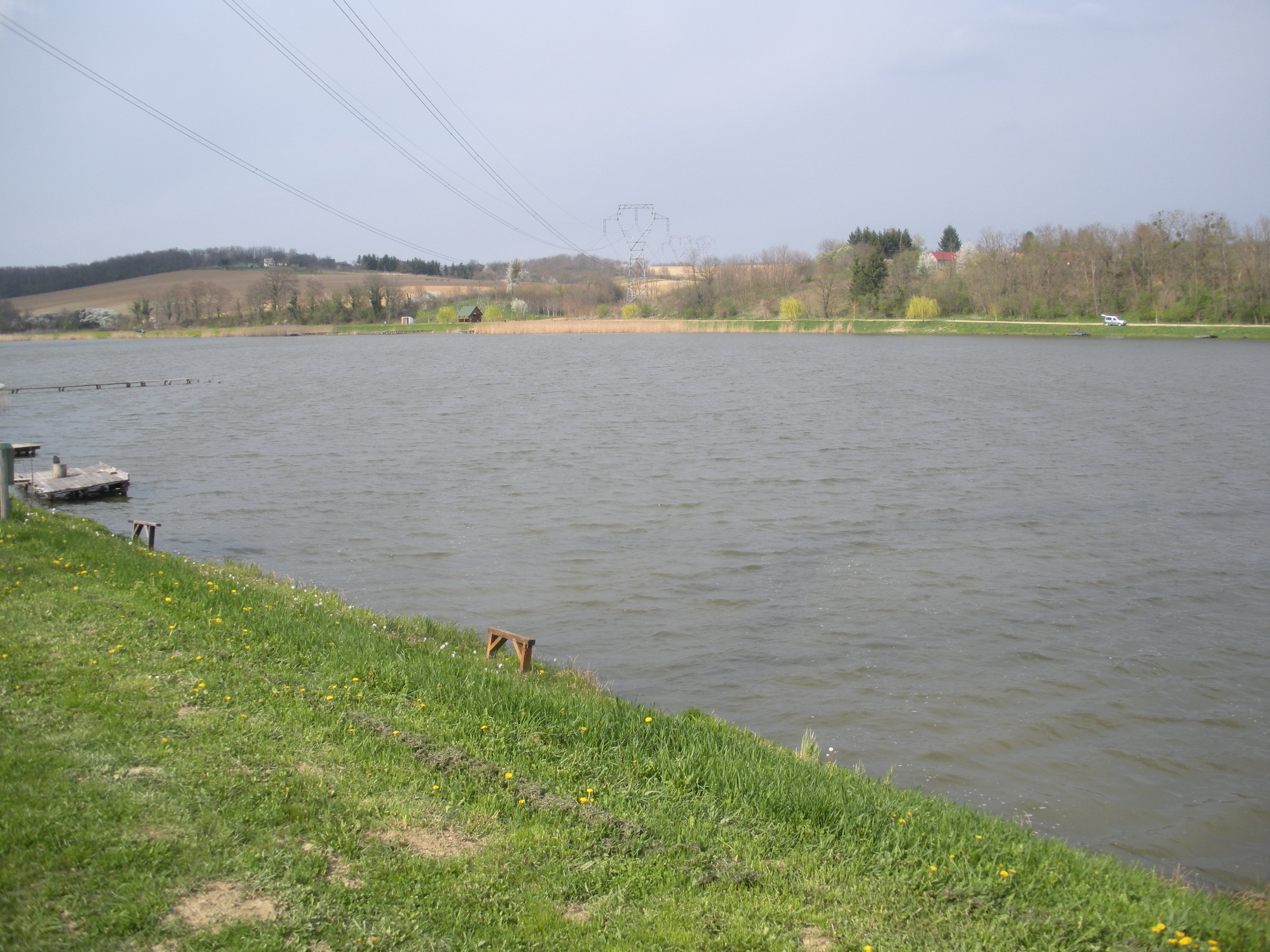 Jóléti víztározó, Zalamerenye, Zala megye